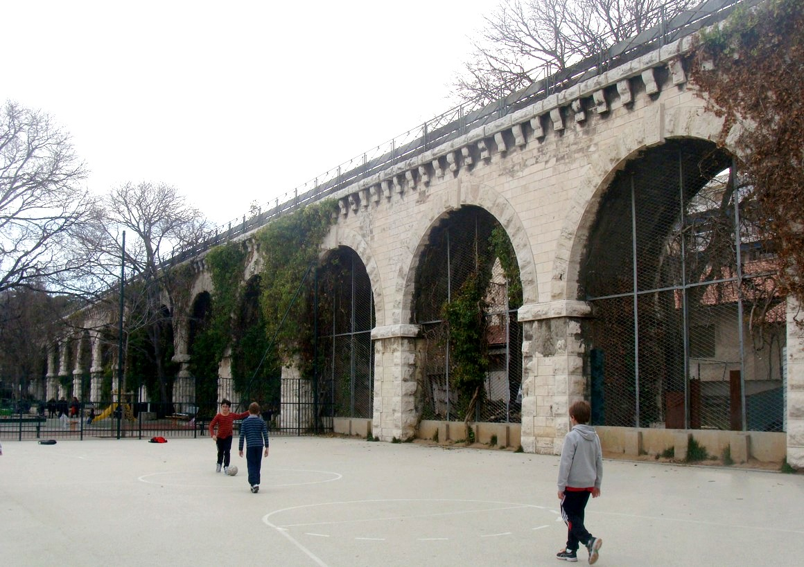 L'aqueduc du jardin Longchamp vu en long dans la partie basse du jardin. Les personnages donnent une indication sur la hauteur de l'édifice (environ 10 mètres).